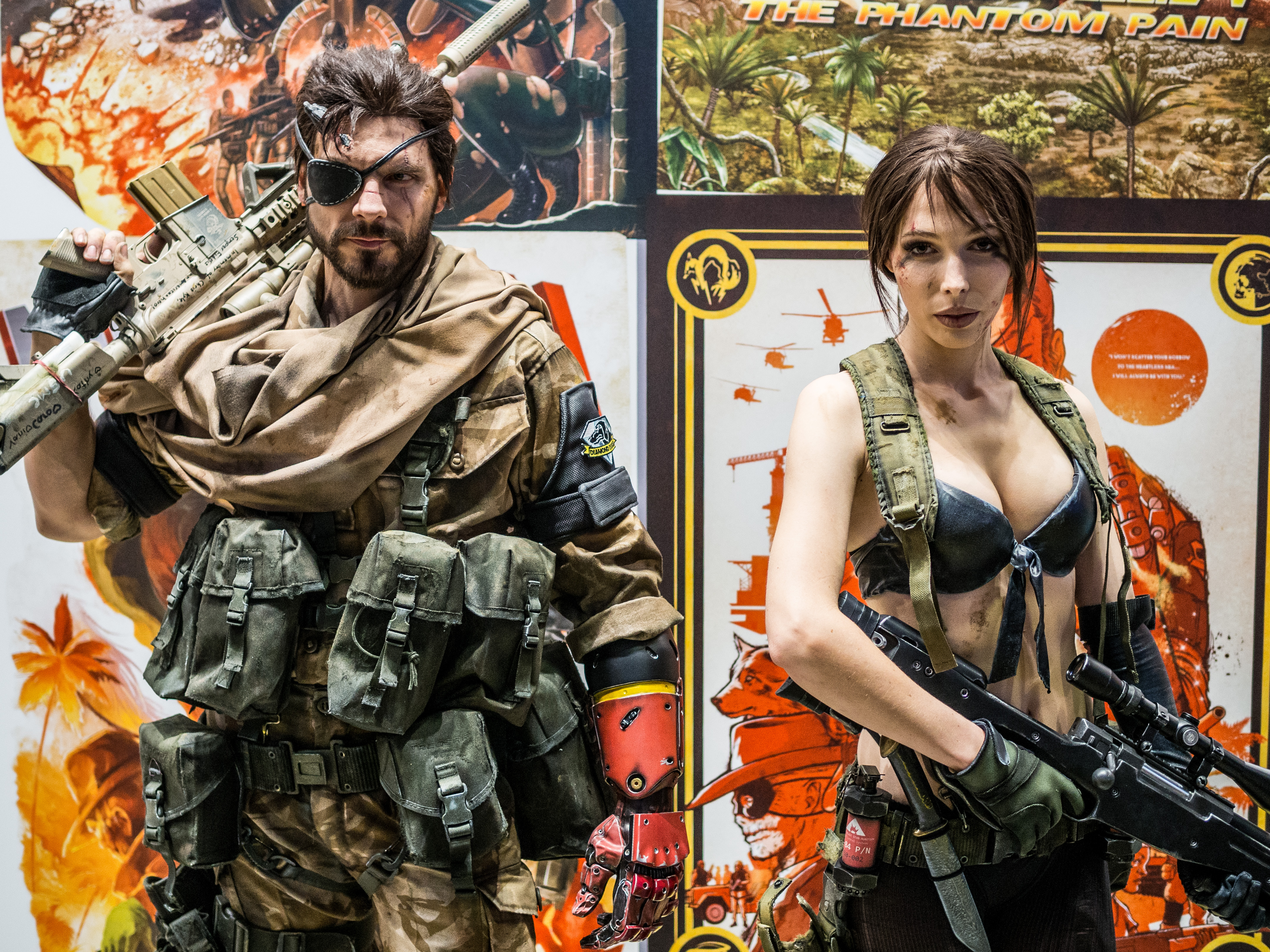 Gamescom 2015, Cologne